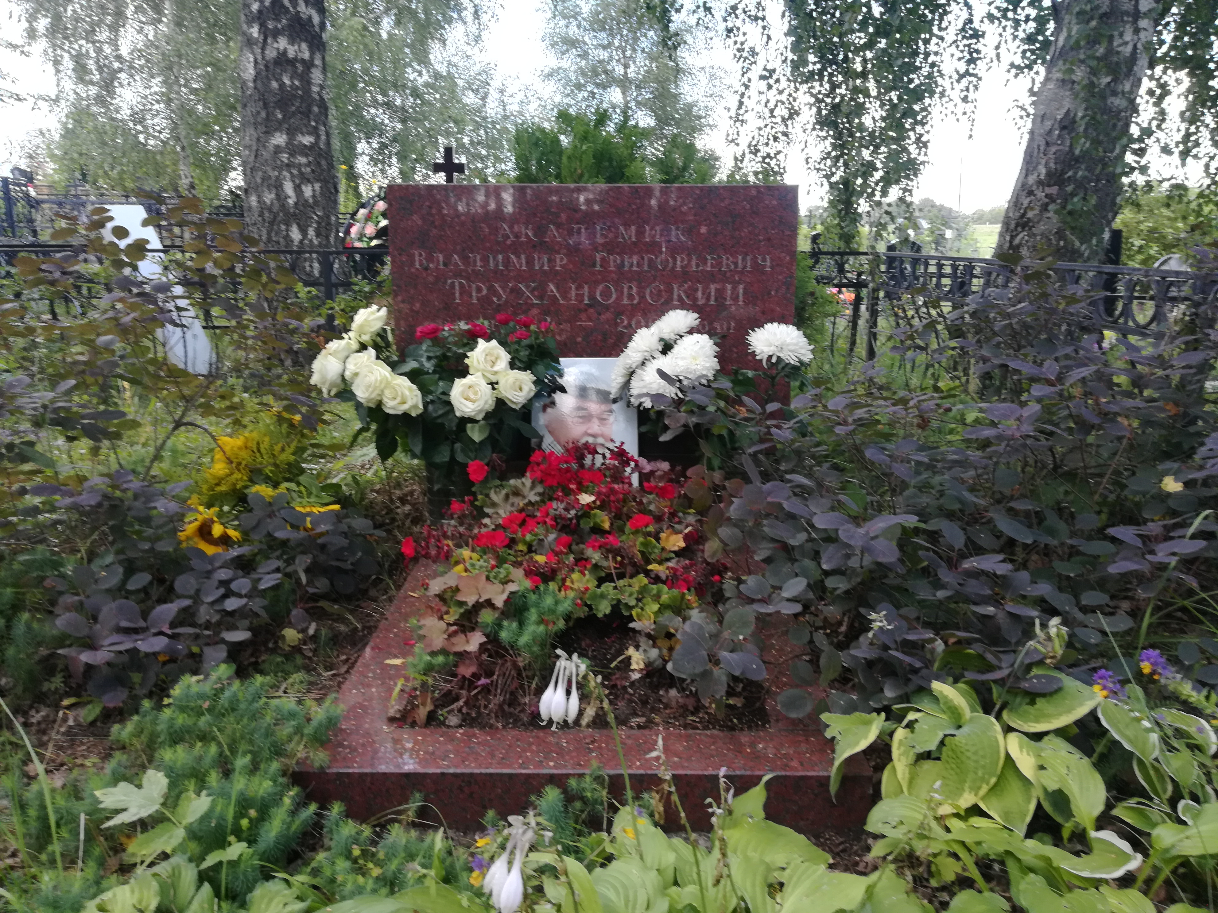 Аксиньинское кладбище